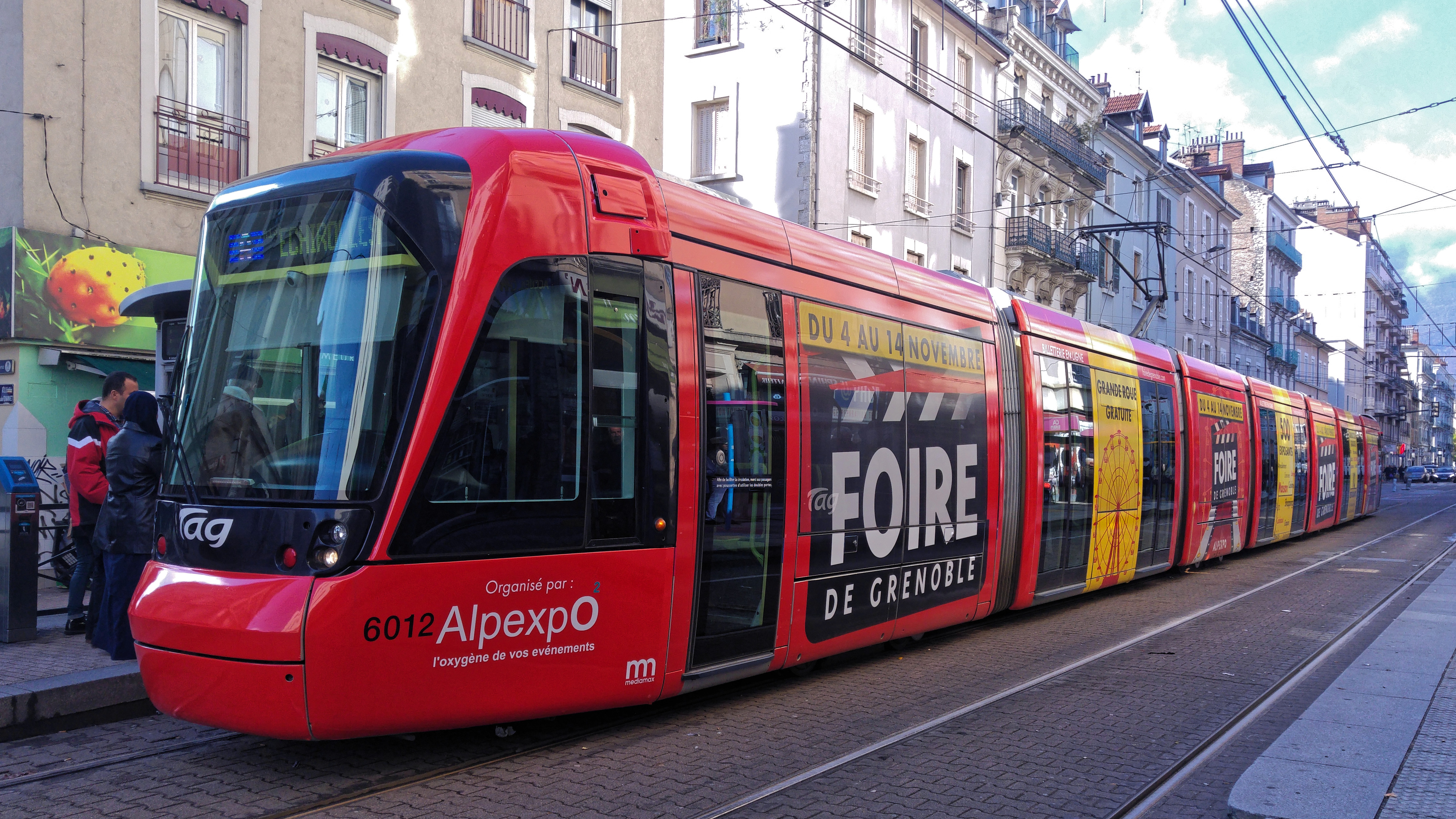 Tram Citadis n°6012 du tramway de Grenoble pelliculé "Foire de Grenoble" à l'arrêt Saint-Bruno